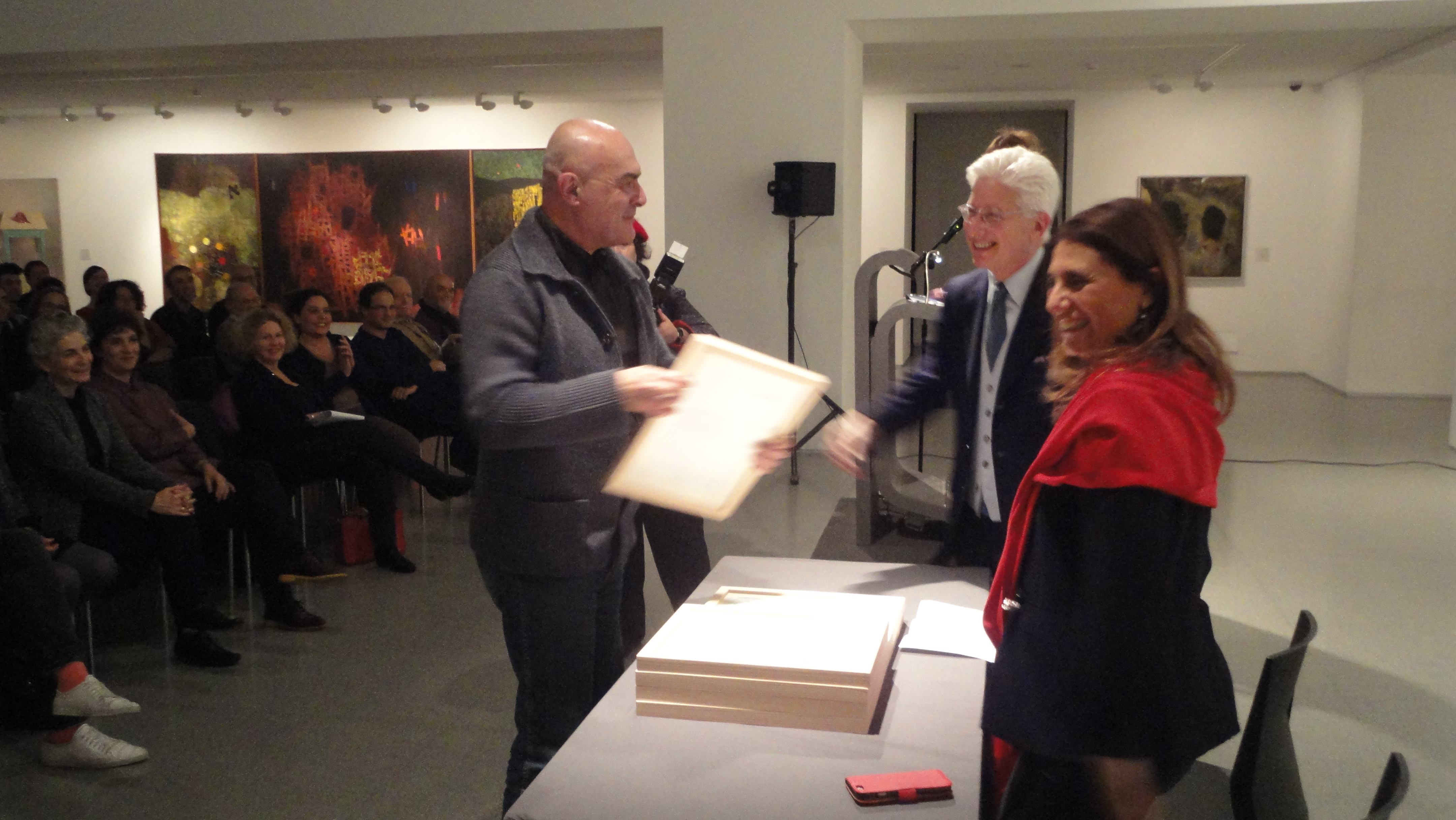 משה ניניו מקבל את פרס סנדברג